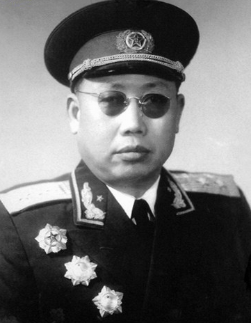 李作鹏授勋授衔标准照